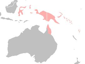 Description=Areale di distribuzione della specie